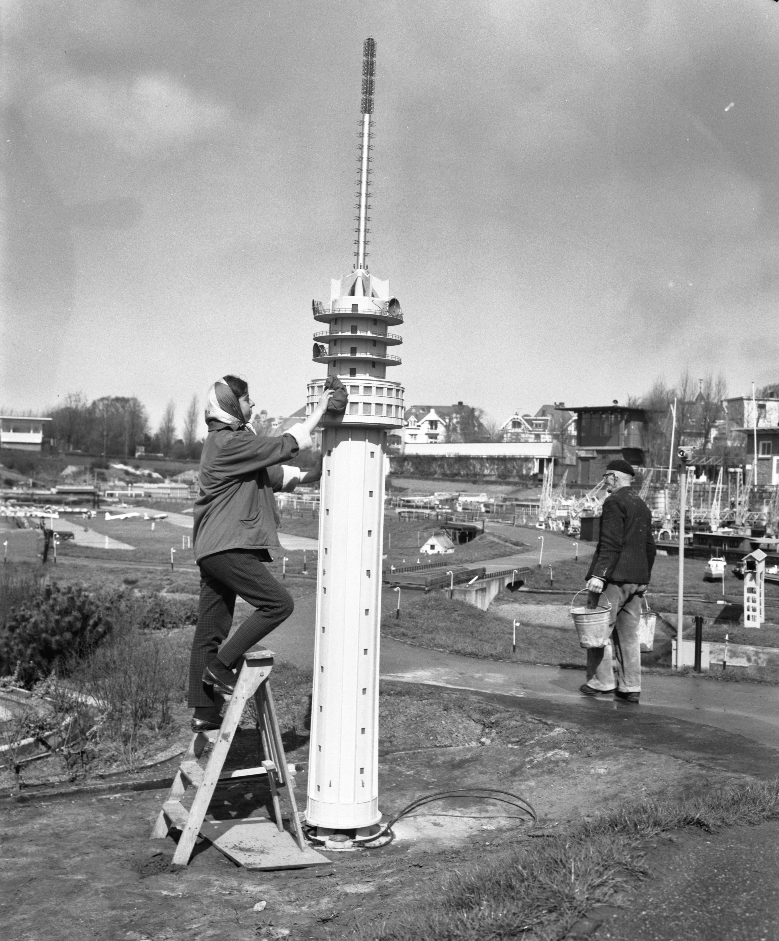 Collectie / Archief : Fotocollectie Anefo Reportage / Serie : [ onbekend ] Beschrijving : Madurodam bereidt zich voor op de opening 7 april aanstaande televisietoren van Markelo wordt ook opgeknapt Datum : 4 april 1960 Locatie : Markelo Trefwoorden : Openingen, televisietorens Instellingsnaam : Madurodam Fotograaf : Rossem, Wim van / Anefo Auteursrechthebbende : Nationaal Archief Materiaalsoort : Negatief (zwart/wit) Nummer archiefinventaris : bekijk toegang 2.24.01.04 Bestanddeelnummer : 911-1450 Reacties Geplaatst door Geertruida op 02 oktober 2014 - 18:49. locatie: Madurodam Plaats: Den Haag, Zuid-Holland